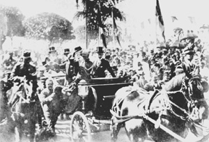 Fotografia do desfile em carro aberto do presidente Hermes da Fonseca em sua posse (1910).